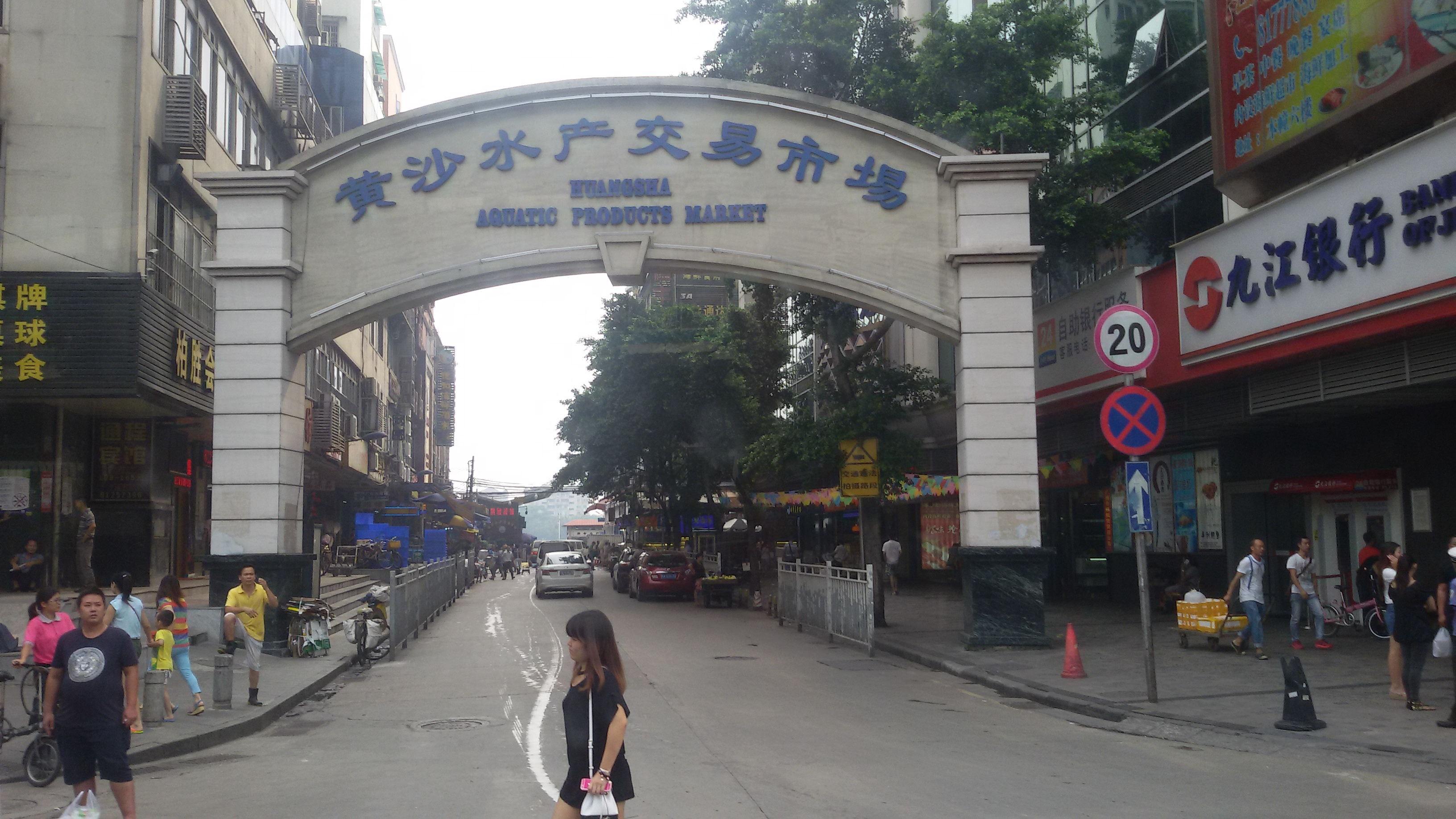 粵語: 黃沙水產交易市場